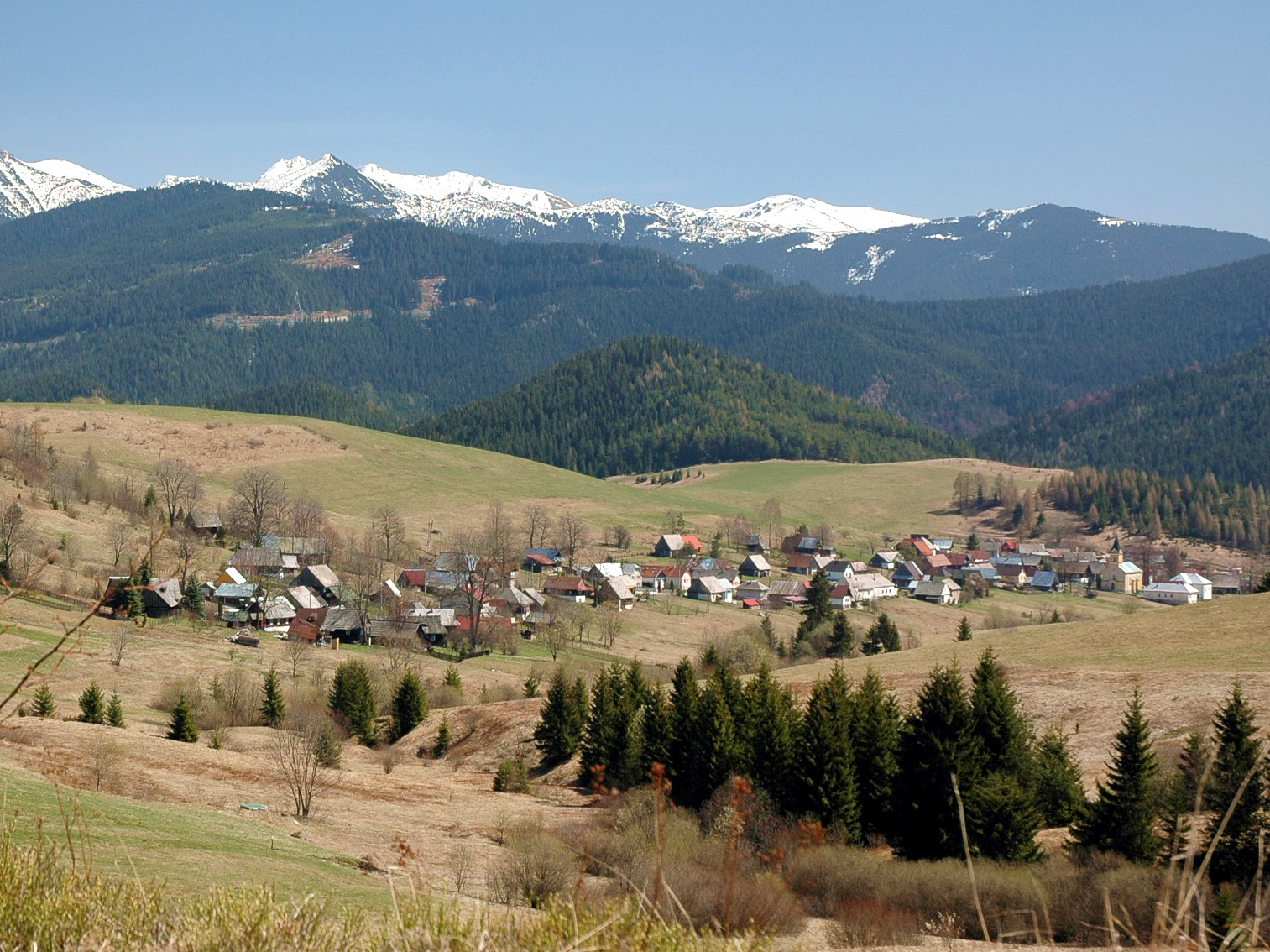 Pohľad z chotára na Veľké Borové, v pozadí Roháče